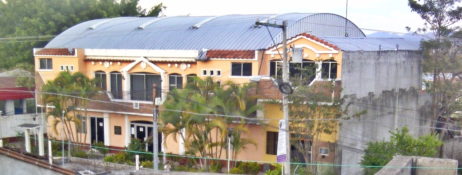 Vista frontal del palacio de gobierno municipal de Esquipulas, sede del Honorable Consejo Municipal y del alcalde del municipio.